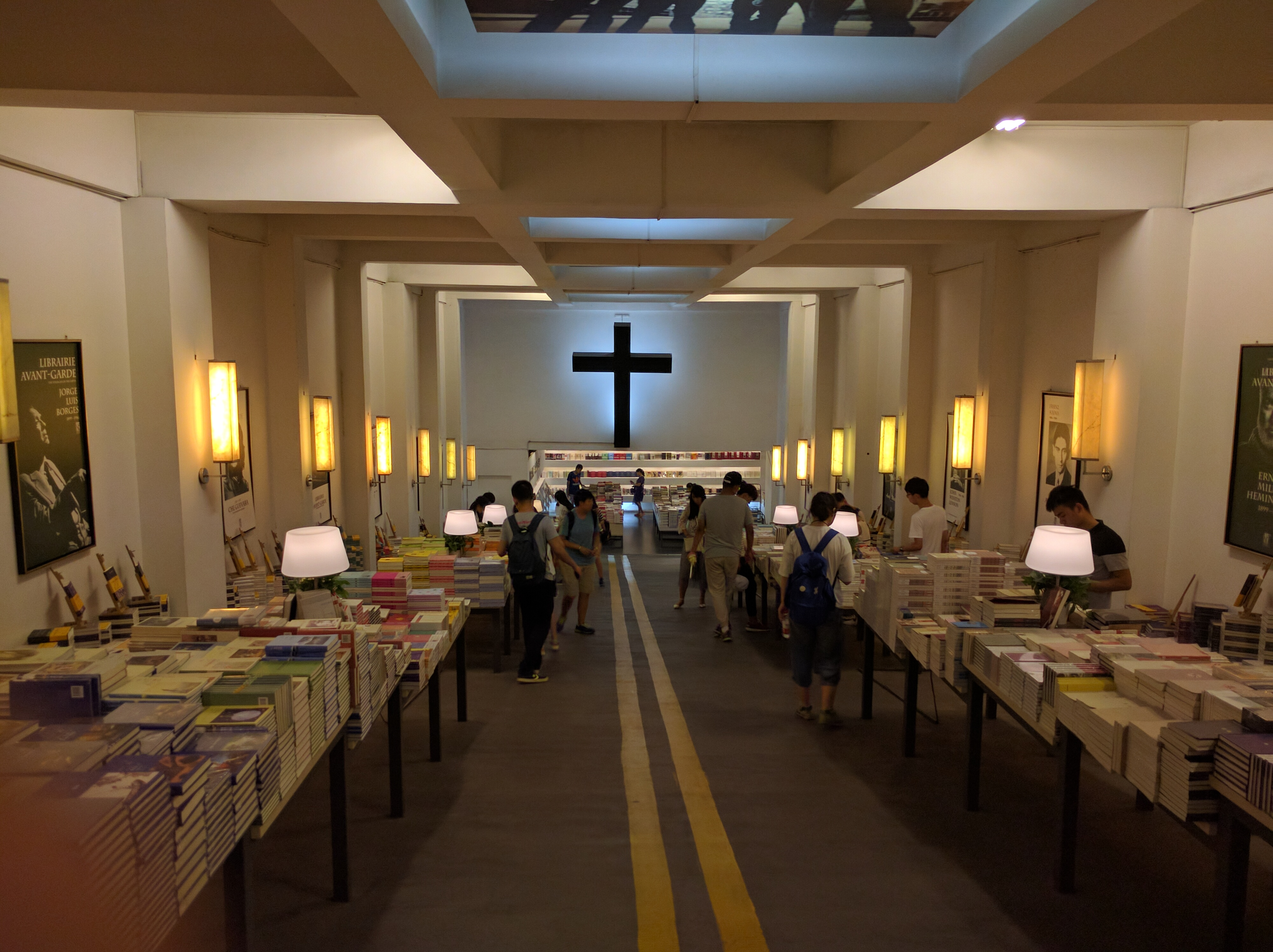 中文（中国大陆）: 南京先锋书店五台山店